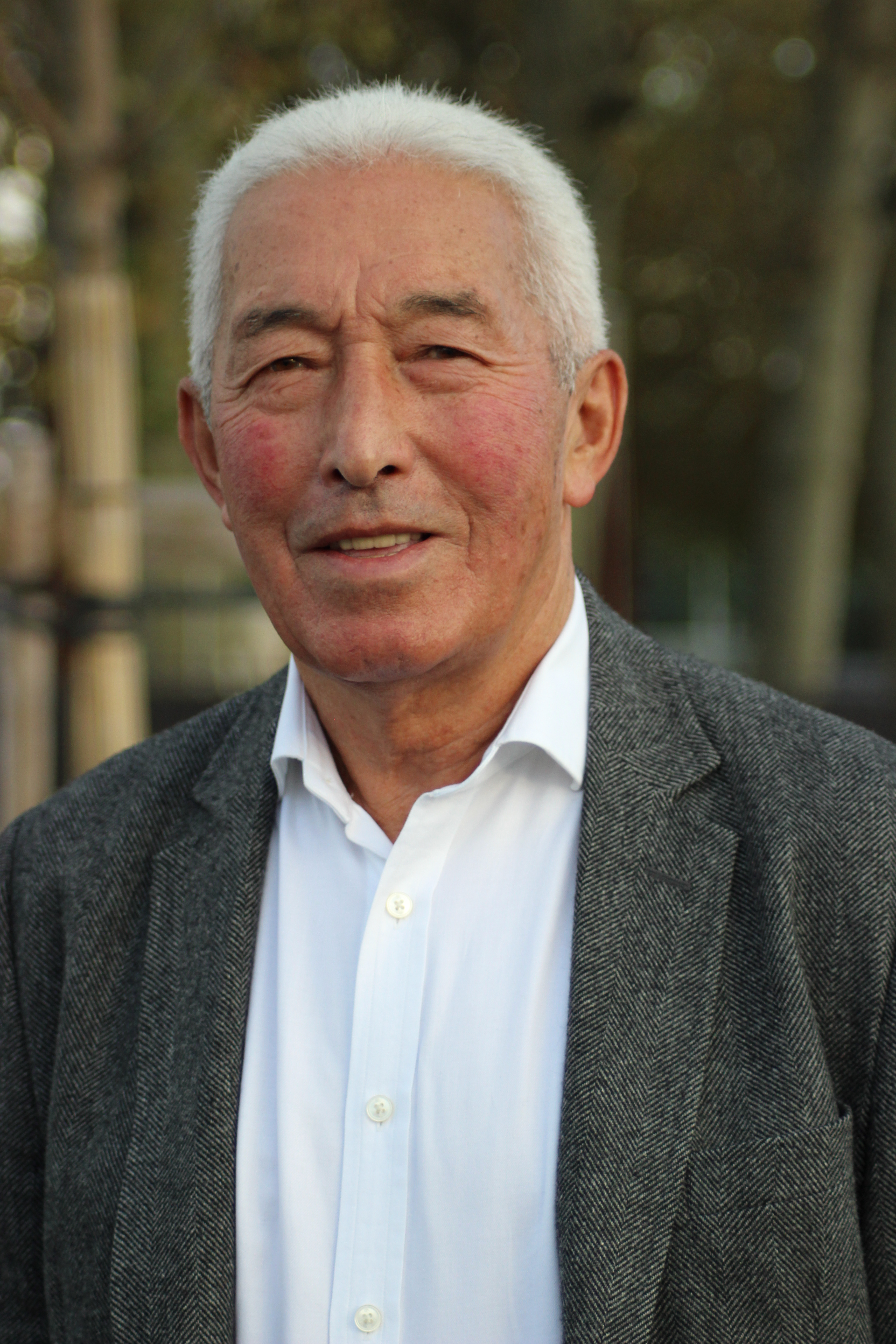 Octobre 2014